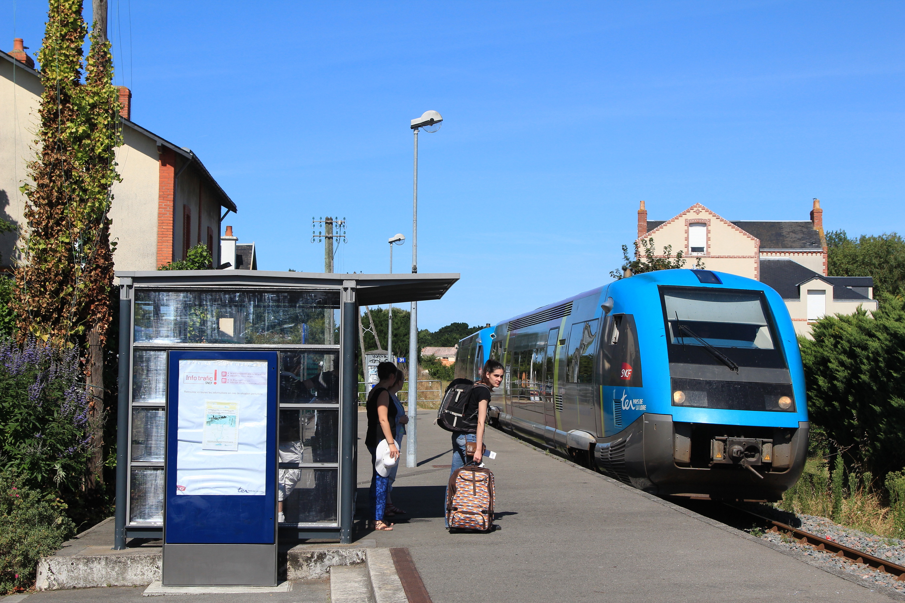 Le TER 859254 Pornic - Nantes à l'arrêt en gare des Moutiers-en-Retz.